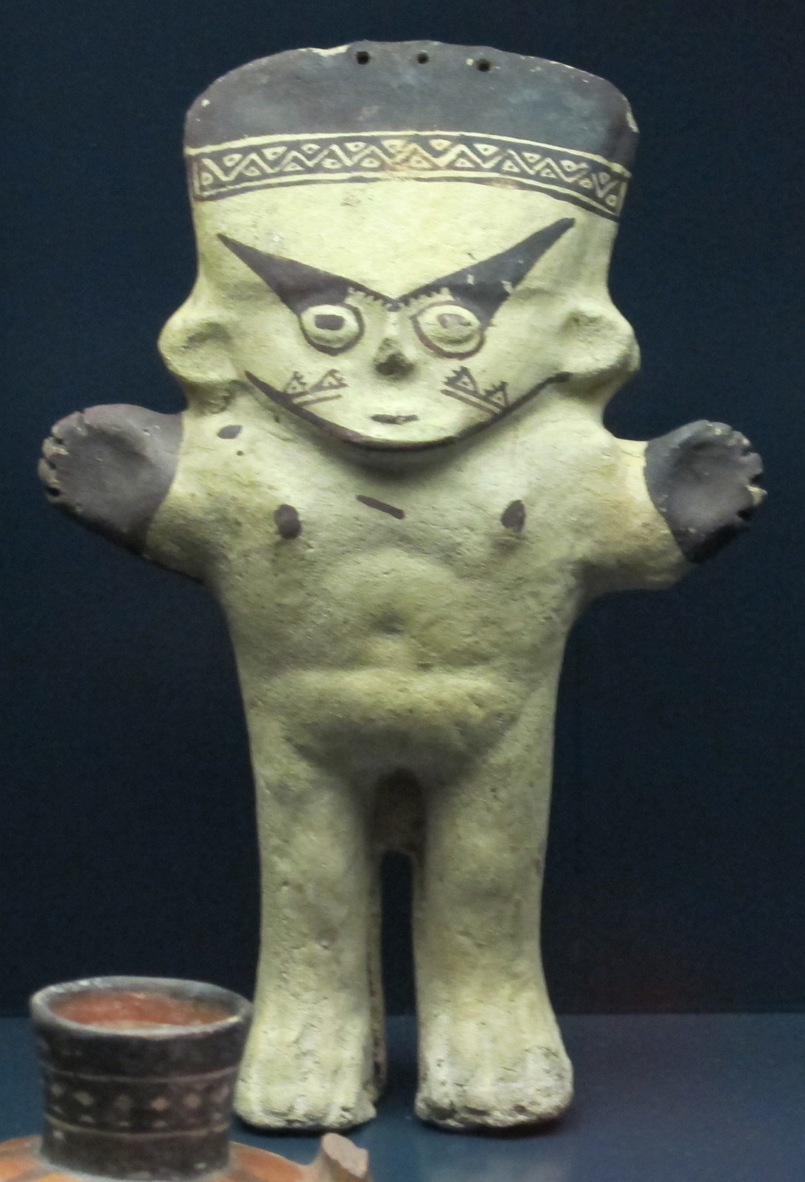 Perù, periodo chancay (1000-1440 ca), figuretta